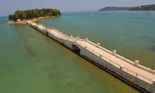 Το όμορφο νησάκι Κουκουμίτσα από ψηλά, φωτογραφία που τραβήχτηκε από Drone, το 2015